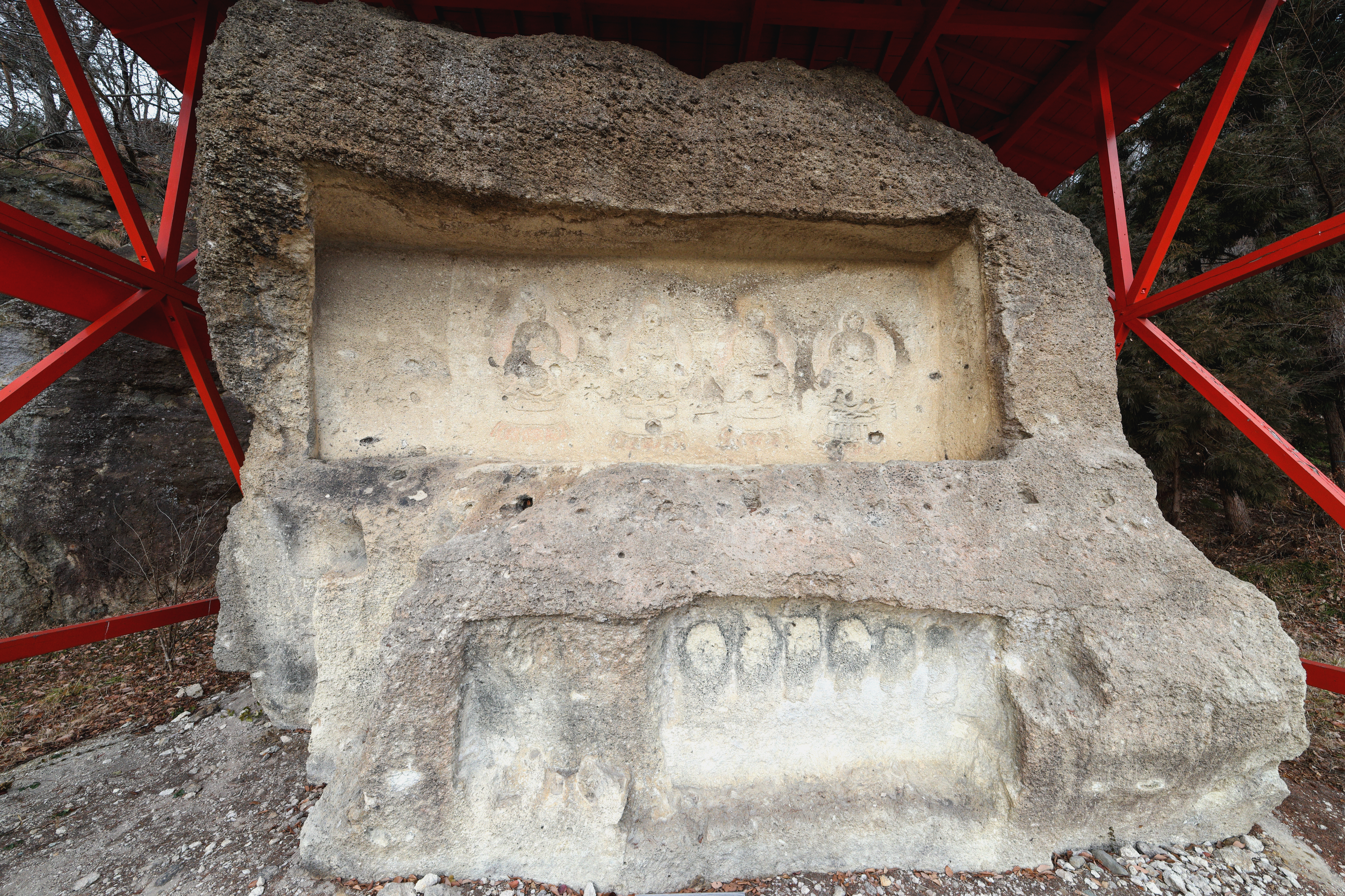 山形県東根市の大森山にある磨崖仏 大森山南麓にある、凝灰岩の大岩南面に掘られている。 風化して居るため、屋根が設置されている。 鎌倉時代末期（1300年頃）の作と推定され、山形県内では最古の磨崖仏である。 上段には五智如来（向かって右から、大日如来（だいにちにょらい）、阿閦如来（あしゅくにょらい「閦」は門の中に人が3つの众）、宝生如来（ほうしょうにょらい）、無量光壽如来（あみだにょらい）（阿弥陀如来）、不空成就如来（ふくうじょうじゅにょらい））で、四体が線彫され朱色の色彩が施された跡もあるが、左端の一体は未完成のままである。 下段には六地蔵が刻まれている。